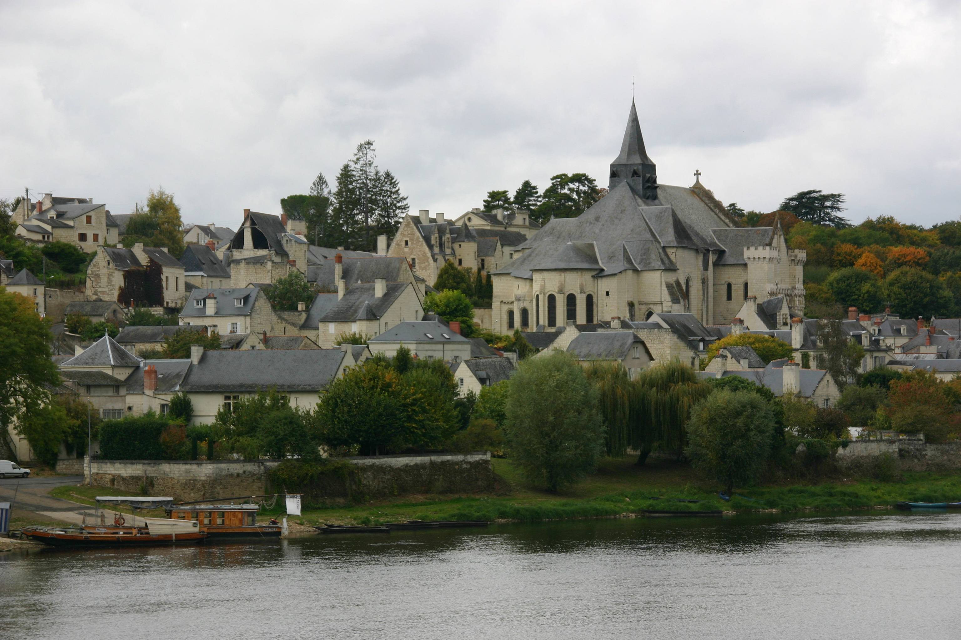 Candes-Saint-Martin